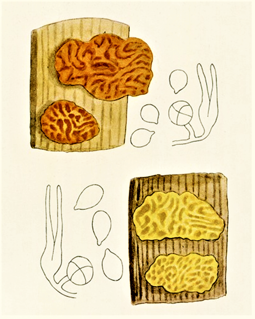 Bres.: Tremella mesenterica Retz., 1769 und derselbe als Tremella lutescens Pers. (1800) Goldgelber Zitterling